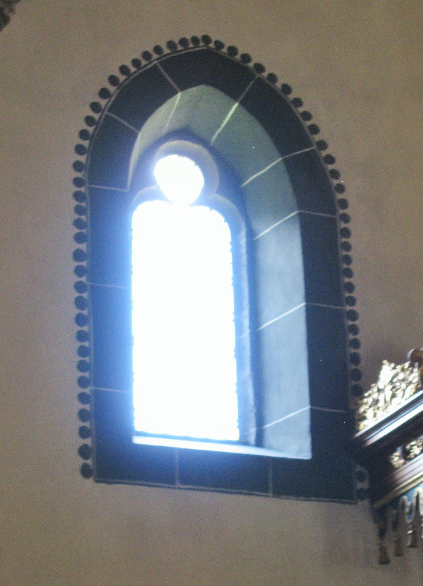 Kleines gotisches Fenster der nördlichen Kirchenschiffwand, Pfarrkirche St. Georg, Ernen (Goms, Wallis, Schweiz). Die Malerei der Fensterumrahmung zeigt eine Reihung von Einzelelementen.